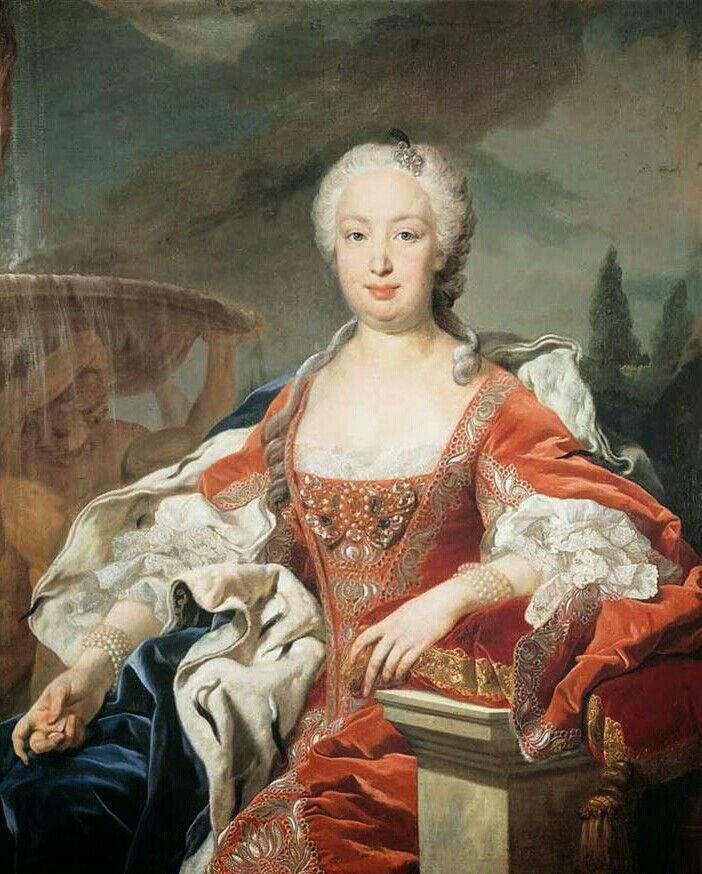 Retrato de la reina Bárbara de Braganza (1711-1758), que fue hija del rey Juan V de Portugal y de la reina María Ana de Austria.